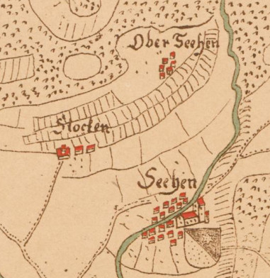 Die Ortschaften Seen, Oberseen und Stocken auf der Gygerkarte von 1664